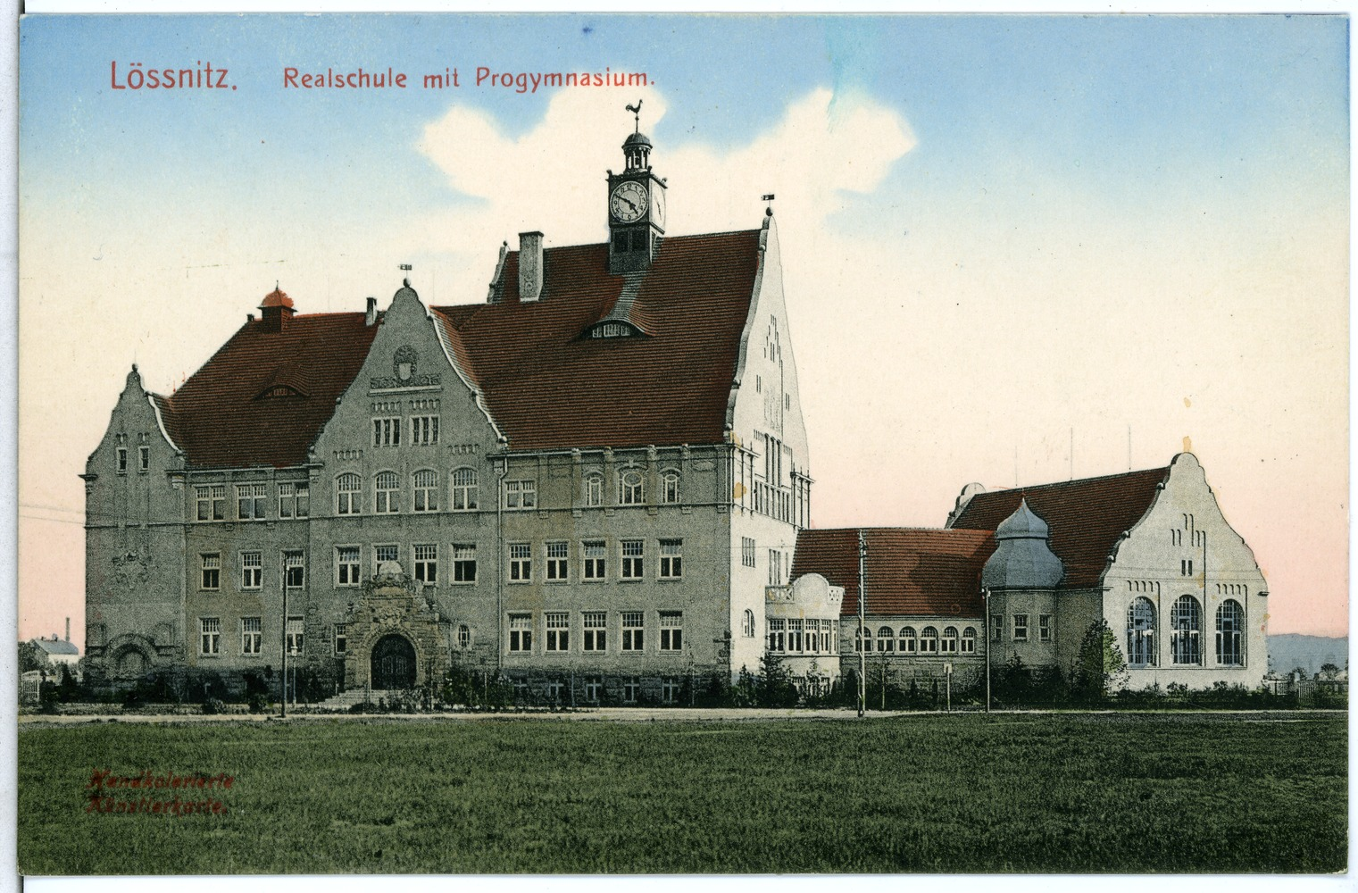 Radebeul; Realschule mit Progymnasium This postcard is from publisher Brück & Sohn in Meißen ( postcard has a unique number 11181 and is available in a higher resolution at the publisher. This images was uploaded in a cooperation project between Wikipedians and the publisher.